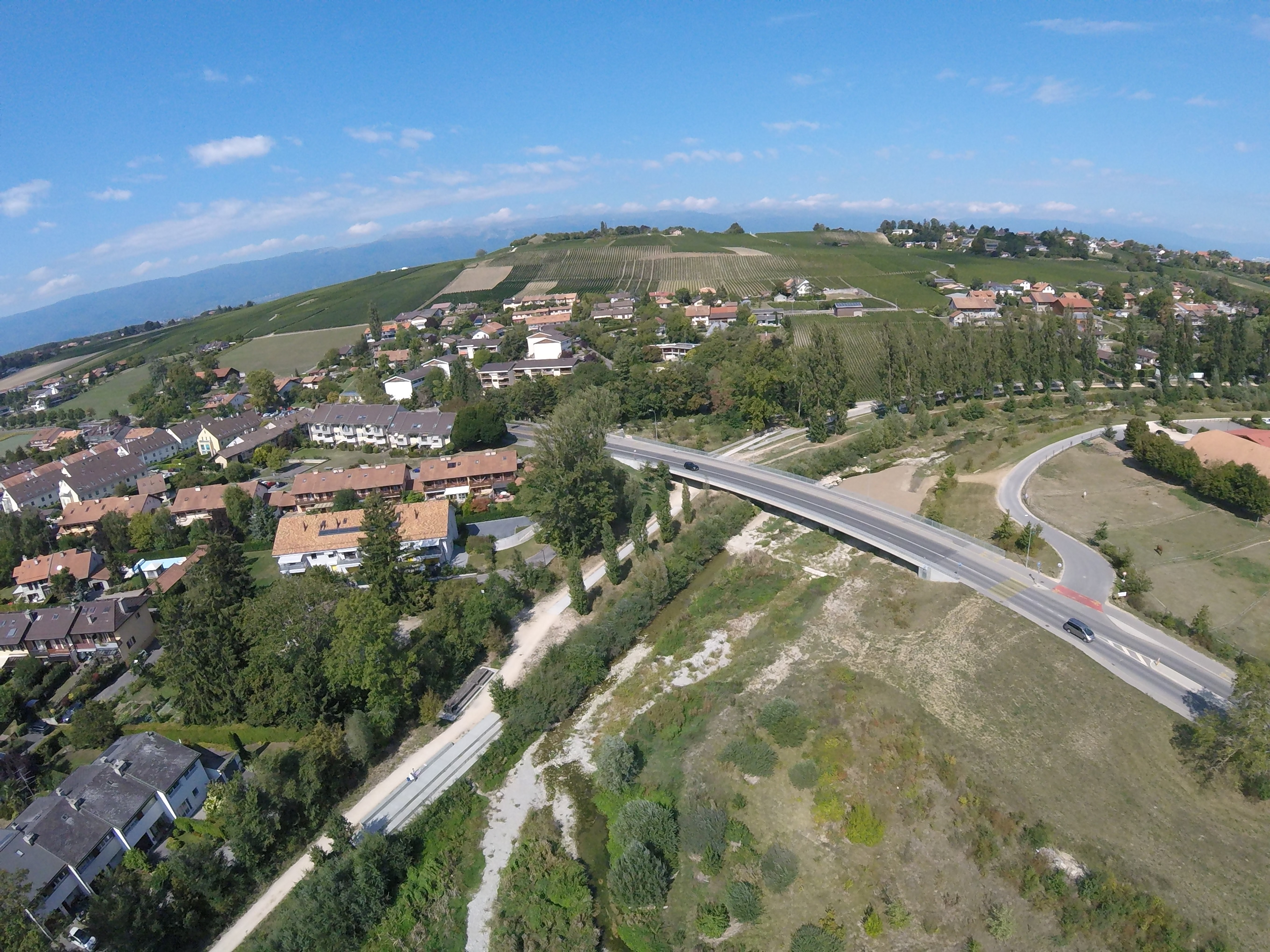 Pont de Lully enjambant L'Aire, vue aérienne